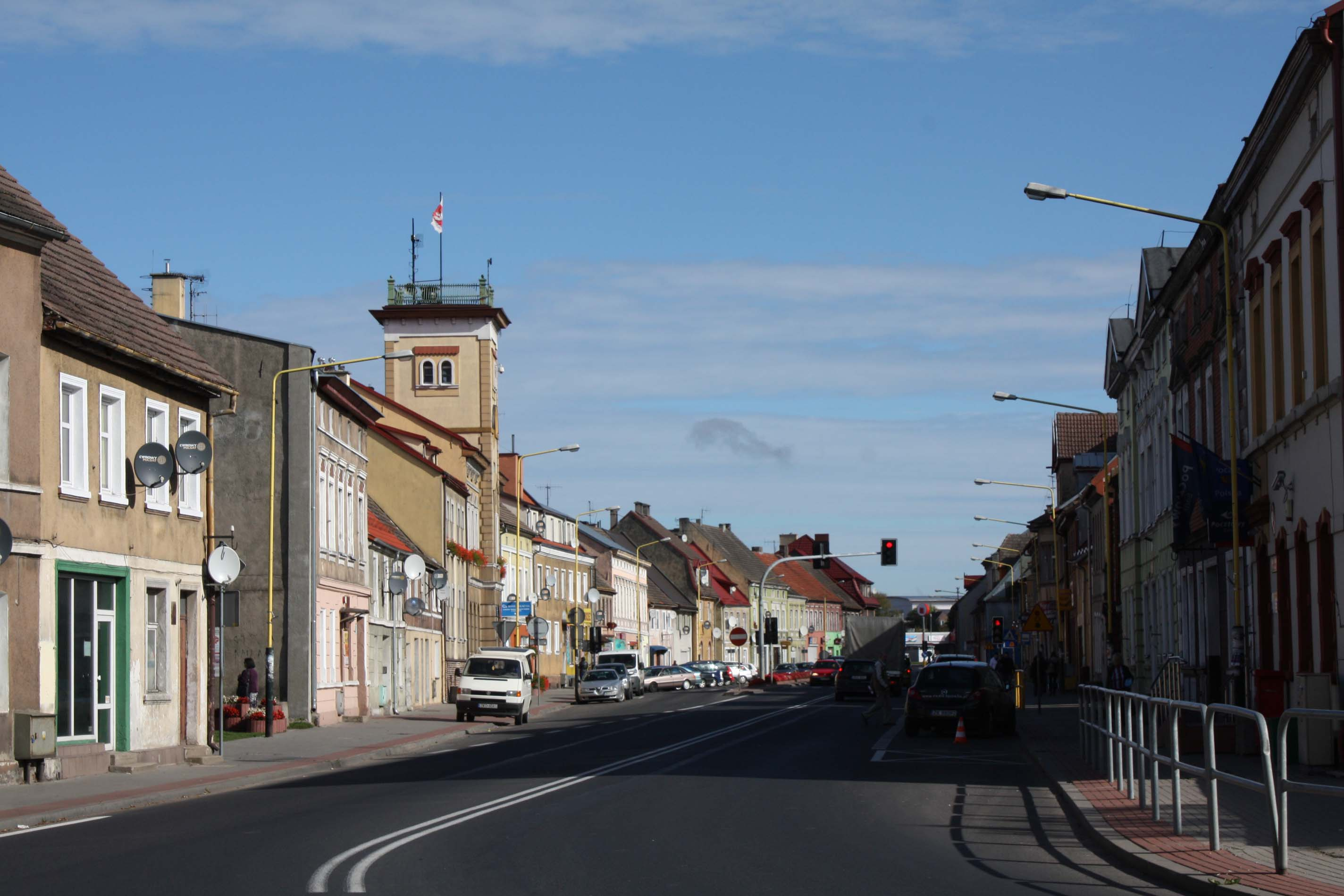 Teren Starego Miasta Sianów